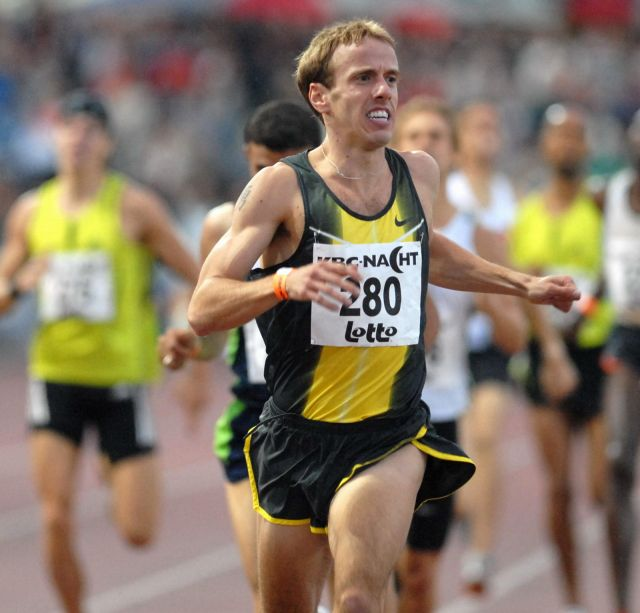 Alan Webb during Nacht van de Atletiek 2008